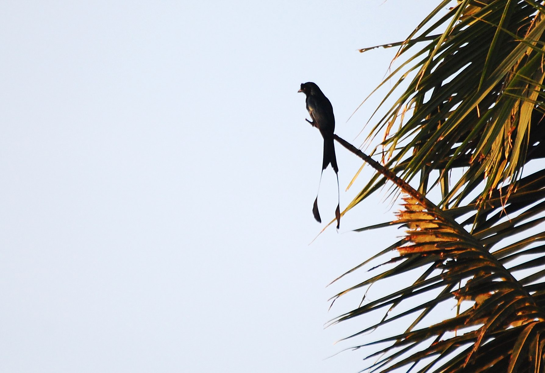 കാടുമുഴക്കി